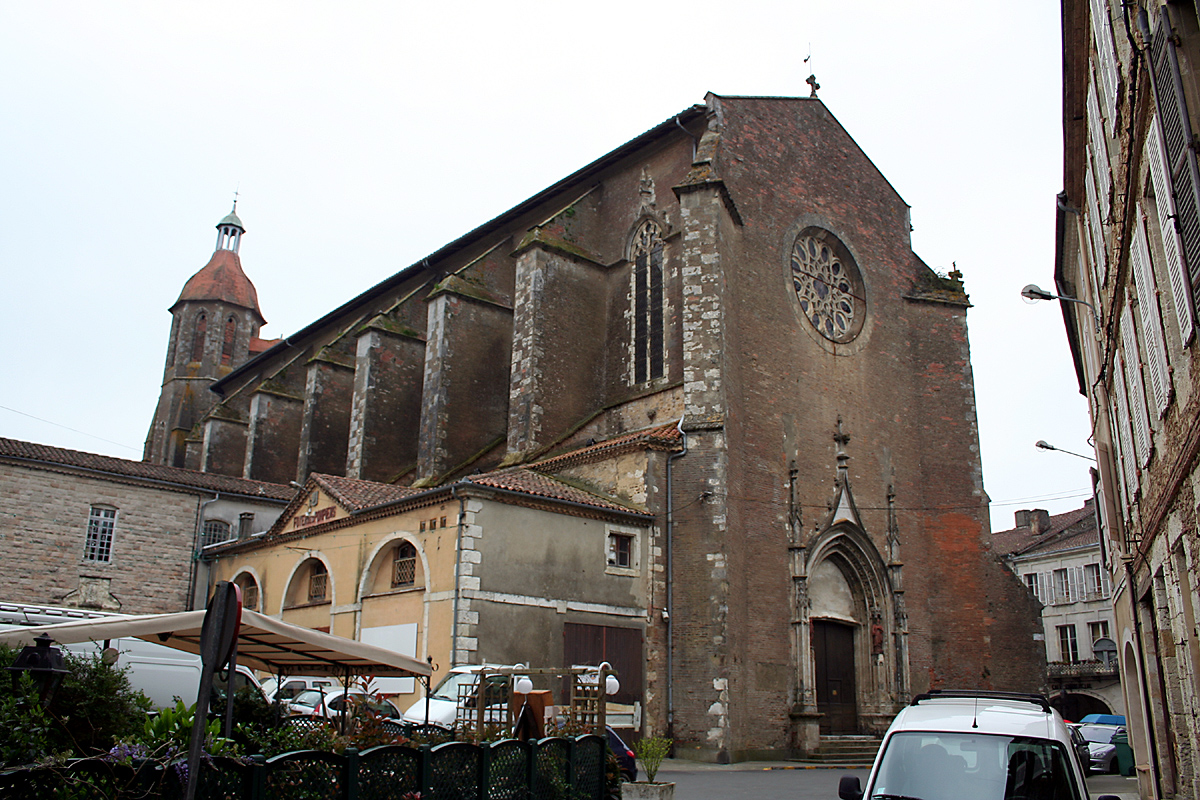 Eauze, Gers, France. Cathédrale Saint-Luperc.